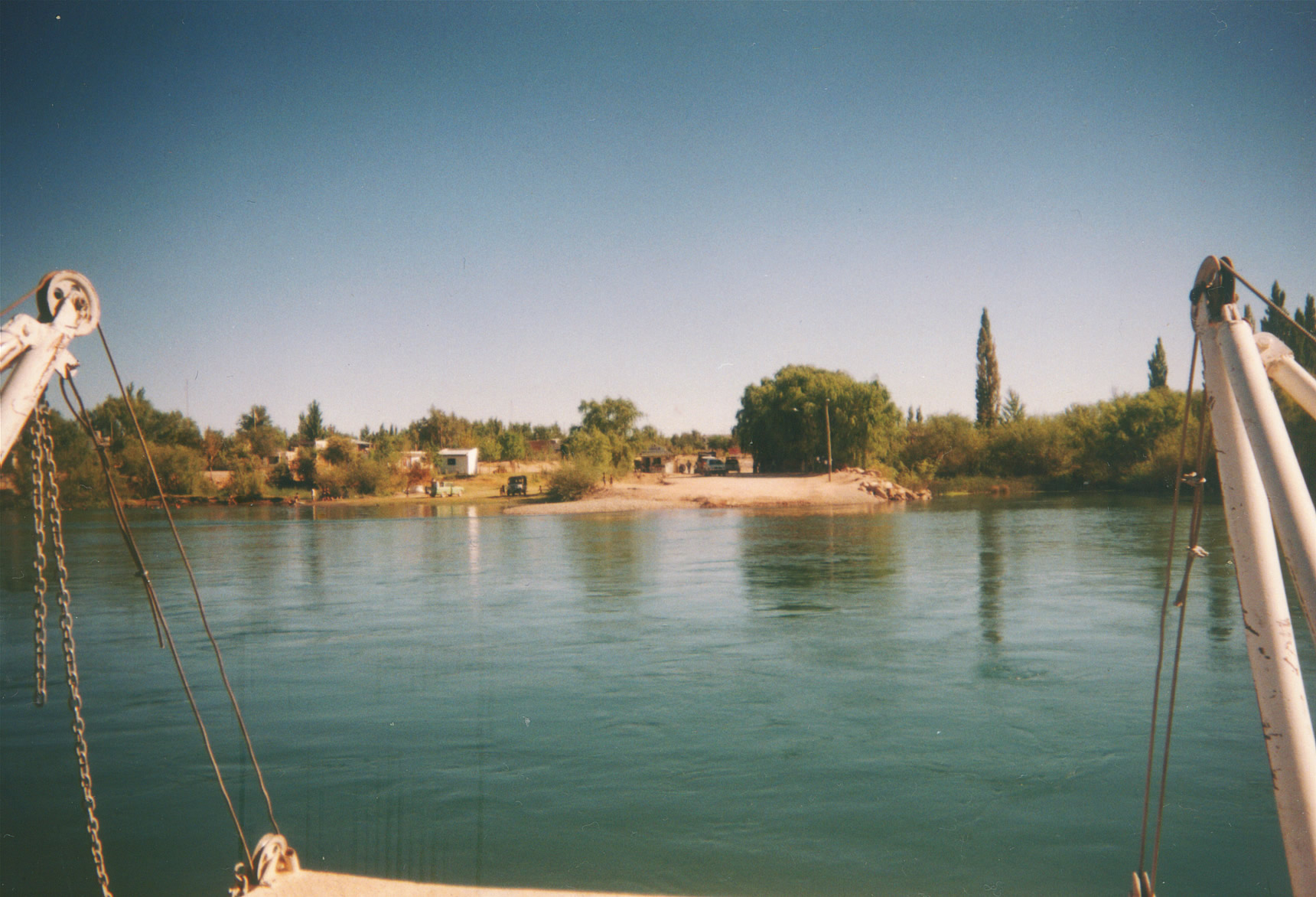 Paso Las Perlas desde la antigua balsa que cruzaba el Río Limay, límite natural entre las provincias de Río Negro y Neuquén, Argentina. El servicio se desactivó el mismo año al inaugurarse el puente carretero. Al fondo, vehículos en la Provincia de Río Negro esperando para cruzar el río.